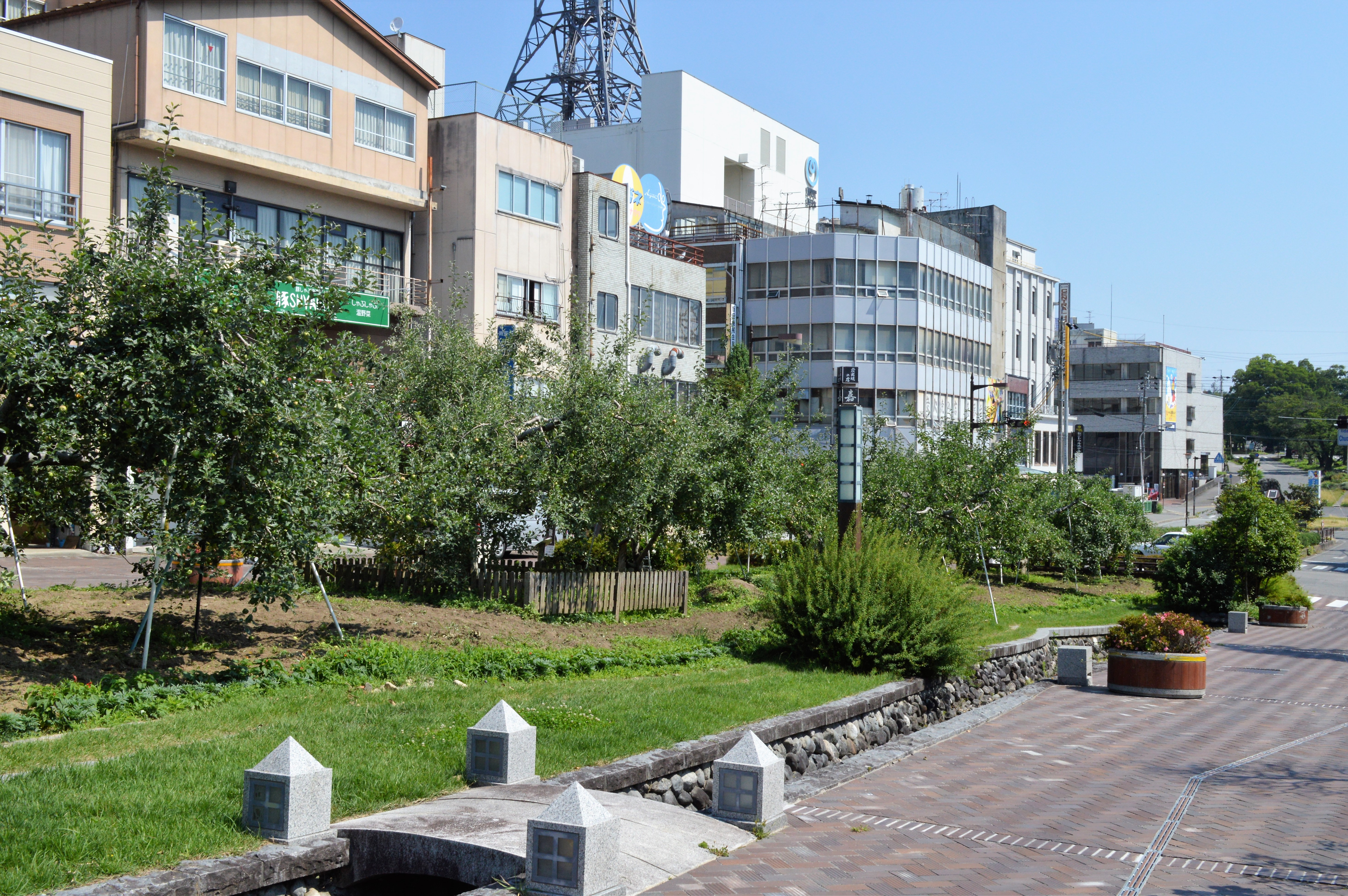 長野県飯田市にある飯田りんご並木。